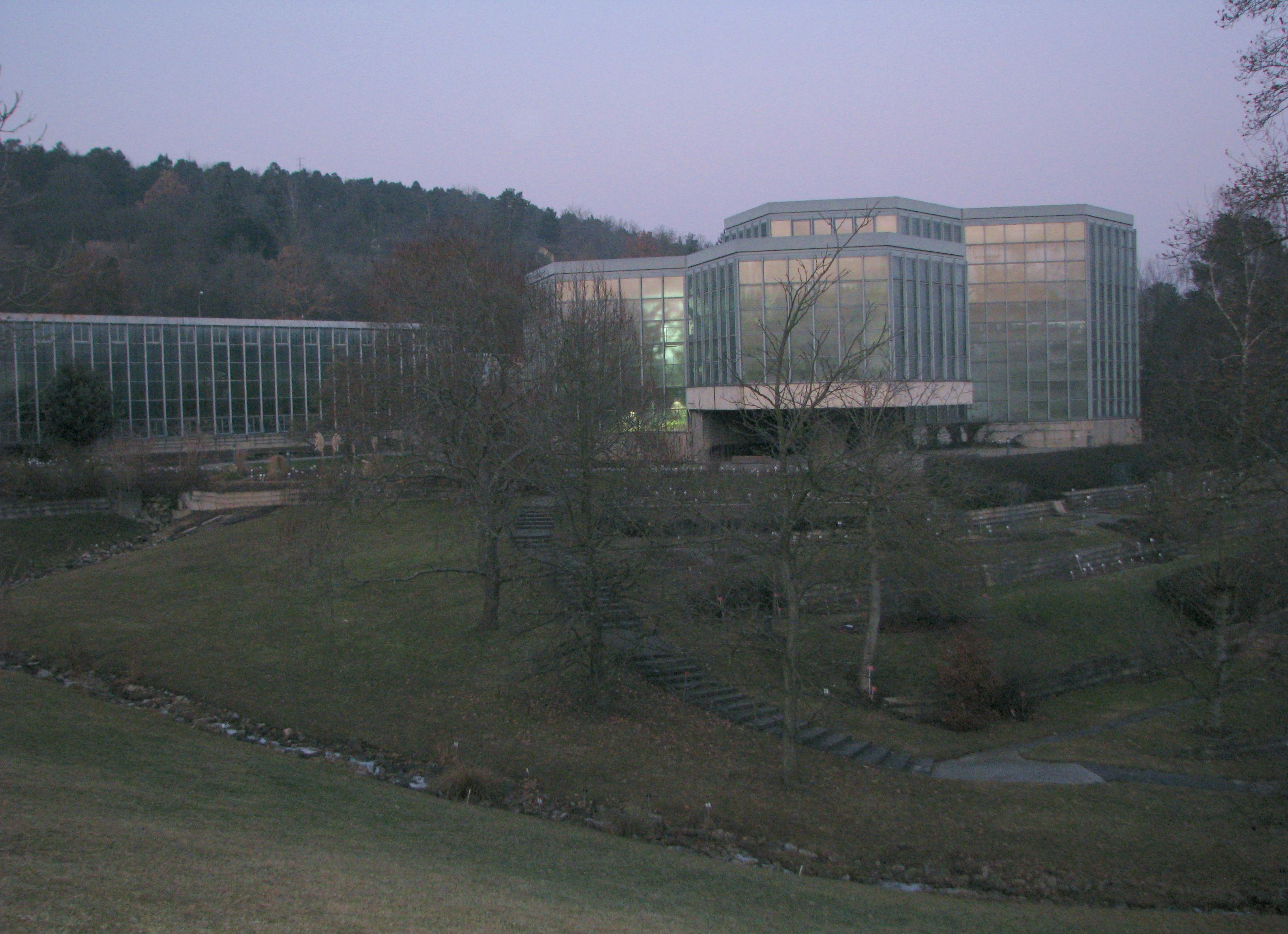 Neuer Botanischer Garten auf der Morgenstelle in Tübingen mit Tropicarium und Außenanlagen.